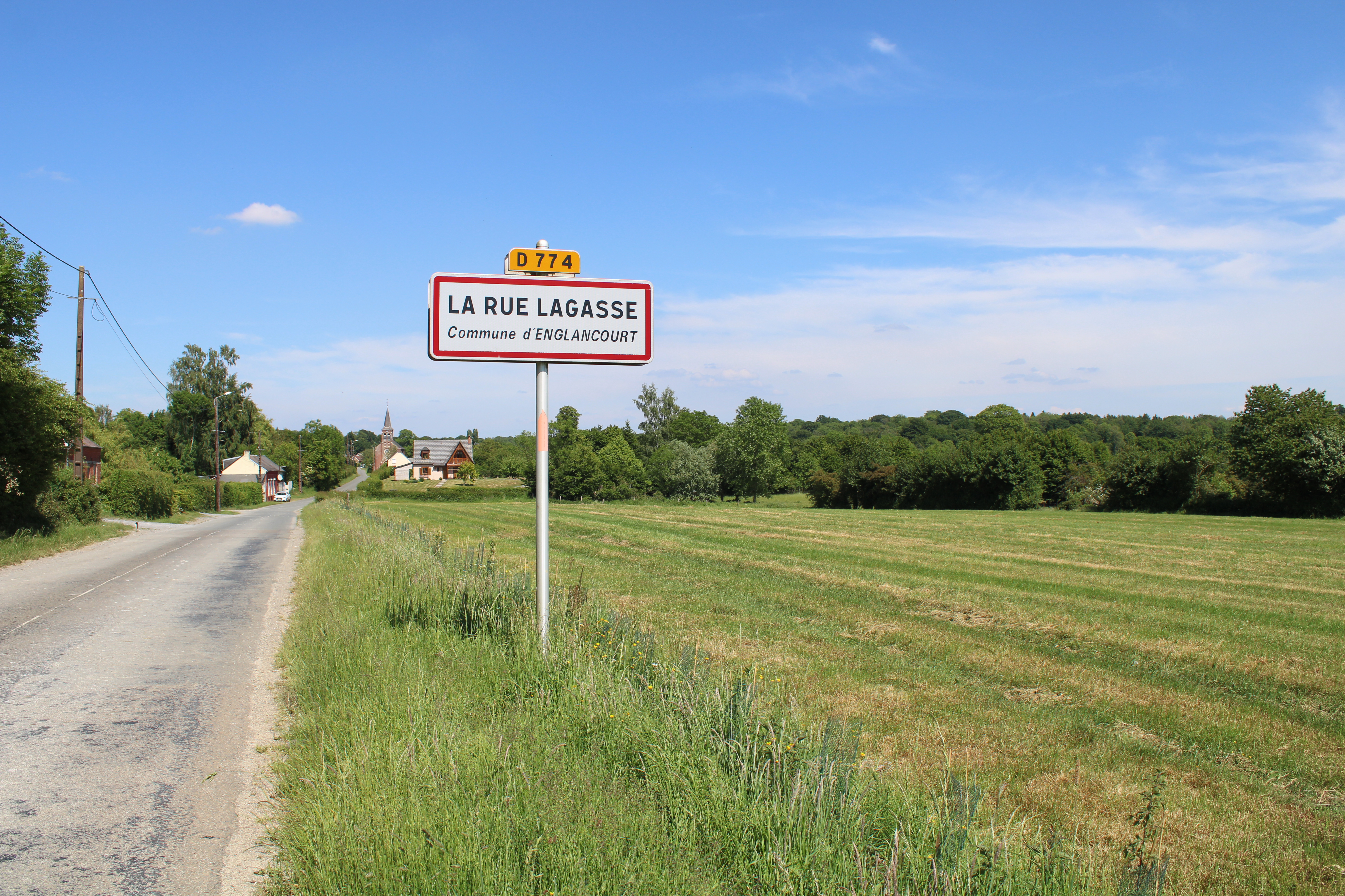 Entrée du hameau